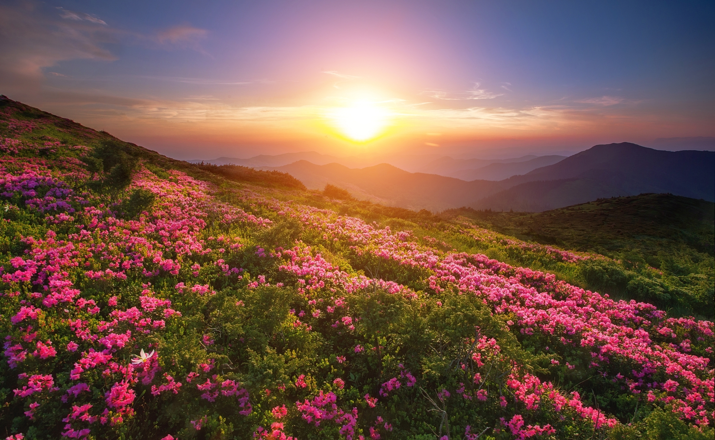 Карпатський біосферний заповідник, Рахівський, Тячівський, Хустський, Виноградівський райони